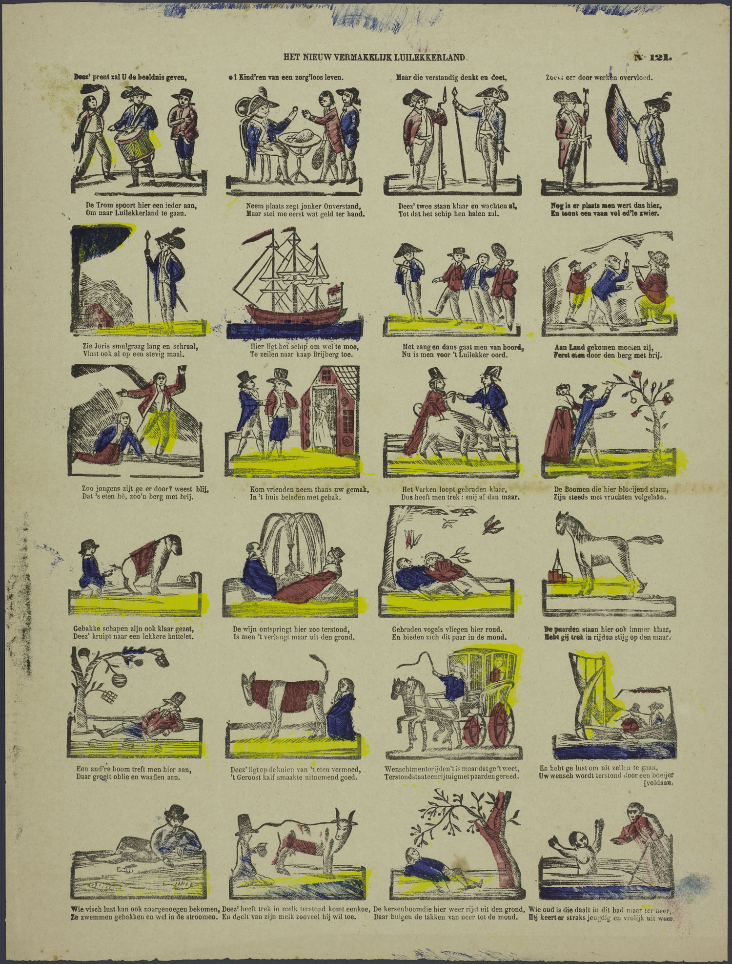 Centsprent met 6 x 4 houtsneden, met niet omkaderde afbeeldingen van het werven van luilekkerlandgangers, de bootreis erheen, het eten door de berg met brij. Hen wacht gebak, gebraden varken, schaap, vogels, kalf, gebakken vis, een wijnfontein, fruit, oblie en wafels, melk en kersen. Paard en een koets staan klaar om te gaan rijden, een zeilboot om te varen en tot slot een verjongingsbad. Bevat tweeregelige rijmende onderschriften, en een wijze les: 'Maar wie verstandig denkt en doet, zoekt eer door werken overvloed.' Zie: Staden 76